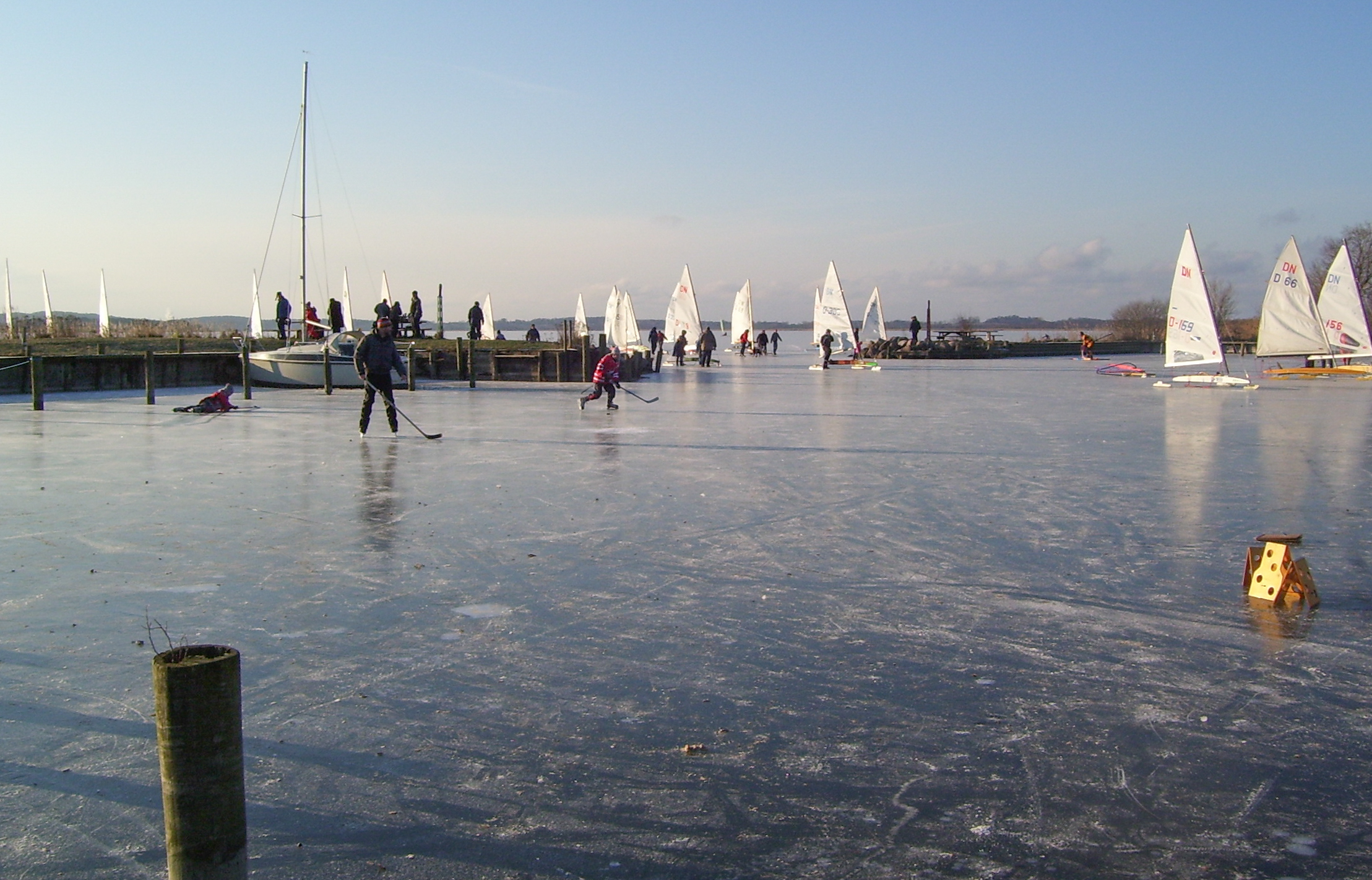 Isbådsejlads på Arresø (ved Ramløse bådehavn)